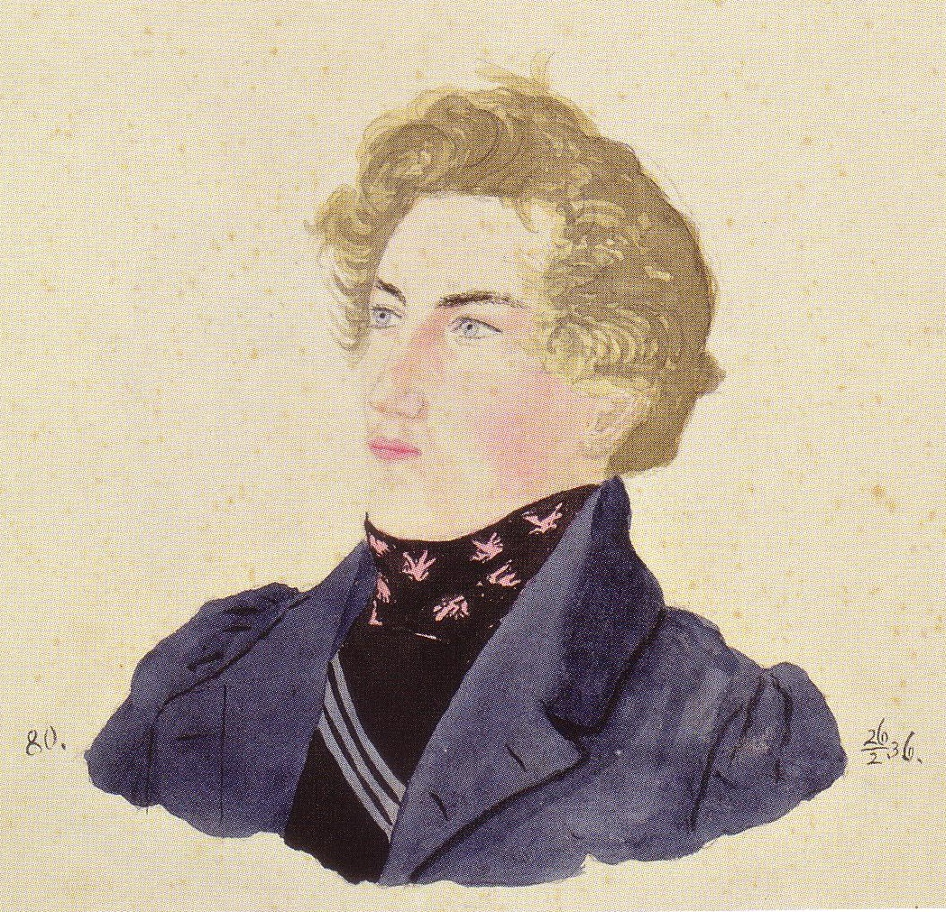 Aquarellporträt von Otto Saro (1818-1888)